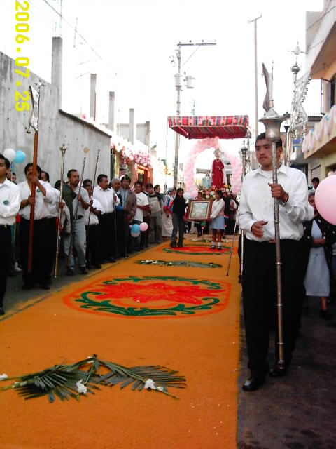 En esta imagen se muestra la procesión de Santa Ana, en Chiautempan, obsérvese la alfombra de aserrín y los miembros del ayuntamiento religioso con sus varas de mando.